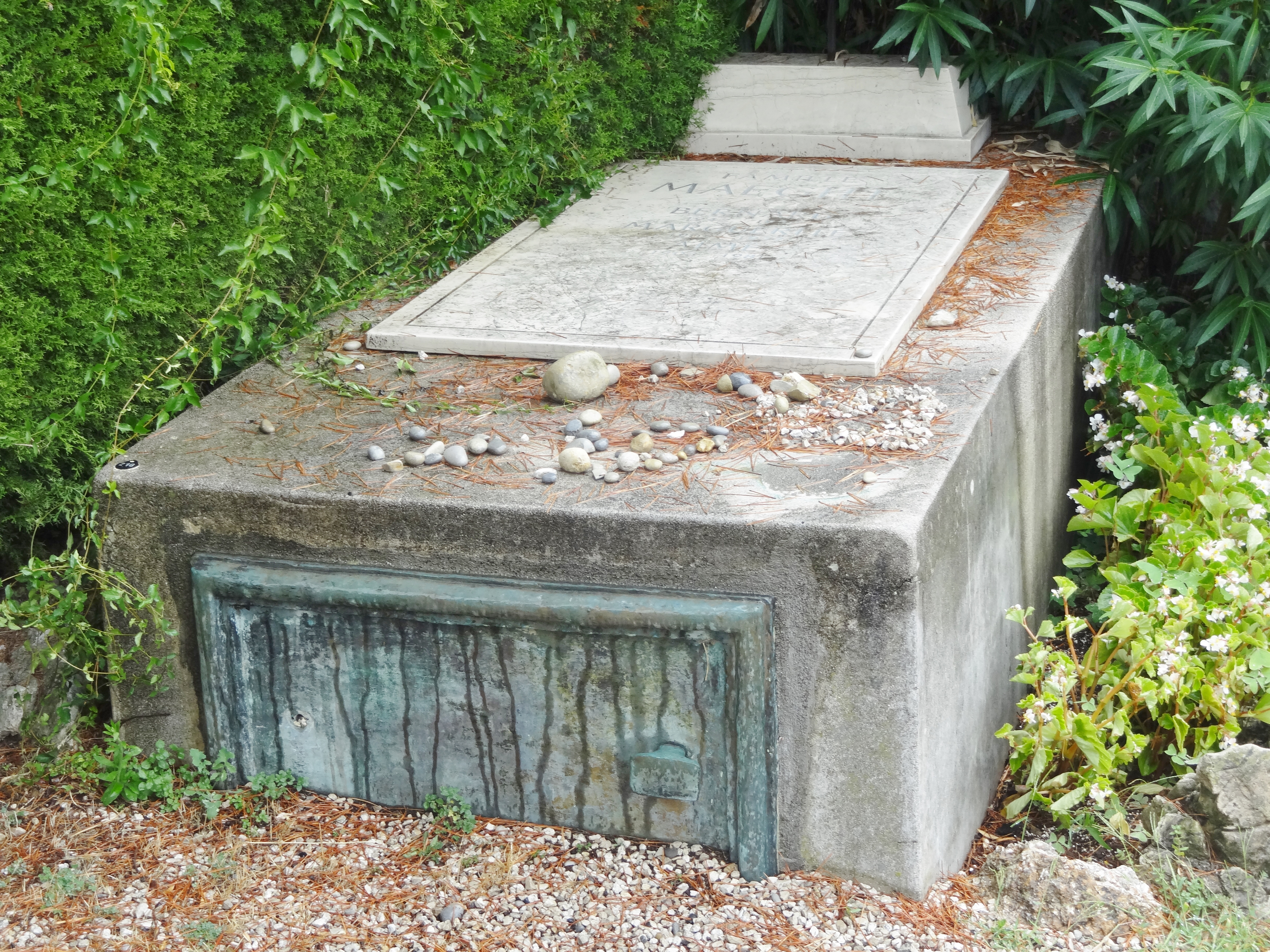 Sépulture d'Aimé, Marguerite et Bernard Maeght, Cimetière de Saint Paul de Vence